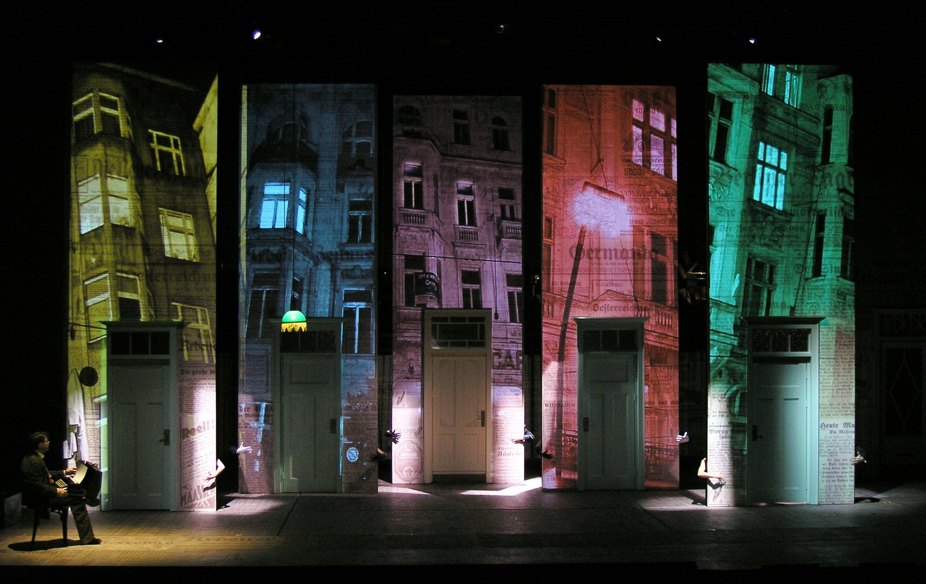 קברט, במאי: עמרי ניצן, מעצב תפאורה: רוני תורן, מעצבת תלבושות: אורנה סמורגונסקי, מעצב תאורה: אבי-יונה בואנו, תיאטרון הקאמרי, 2011.